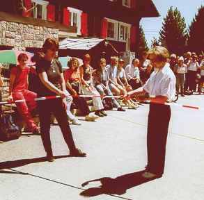 Bundesrätin Elisabeth Kopp und Brigitte Hauser, Präsidentin des Vereins Zukunft Frau, eröffnen den Frauen-Zitatenweg in Unterbäch, Kanton Wallis, Schweiz.